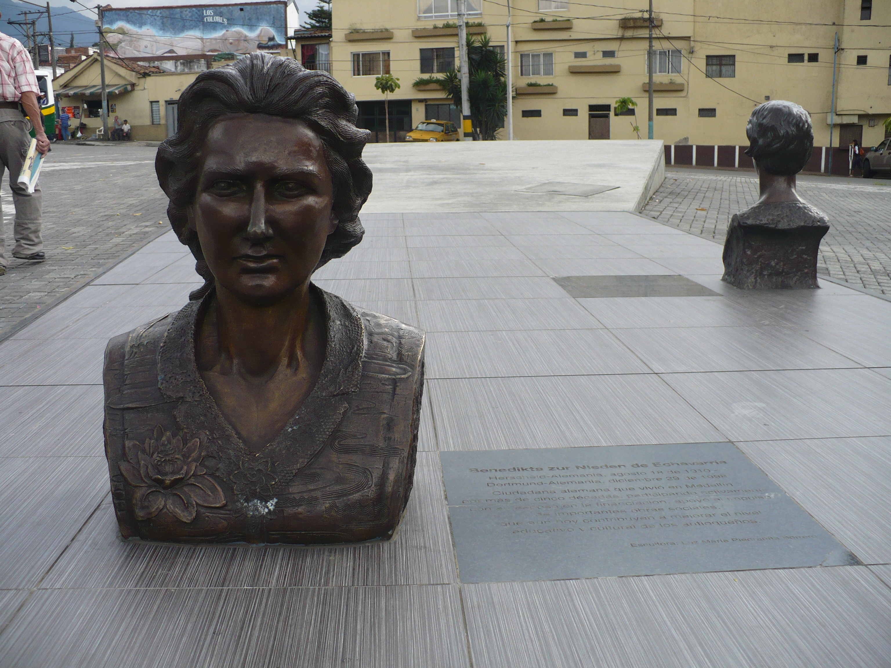 Busto de Benedikta zur Nieden de Echavarría en la Esquina de las Mujeres, Medellín.